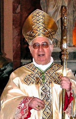 La presente fotografia Ã¨ stata scattata da me personalmente.